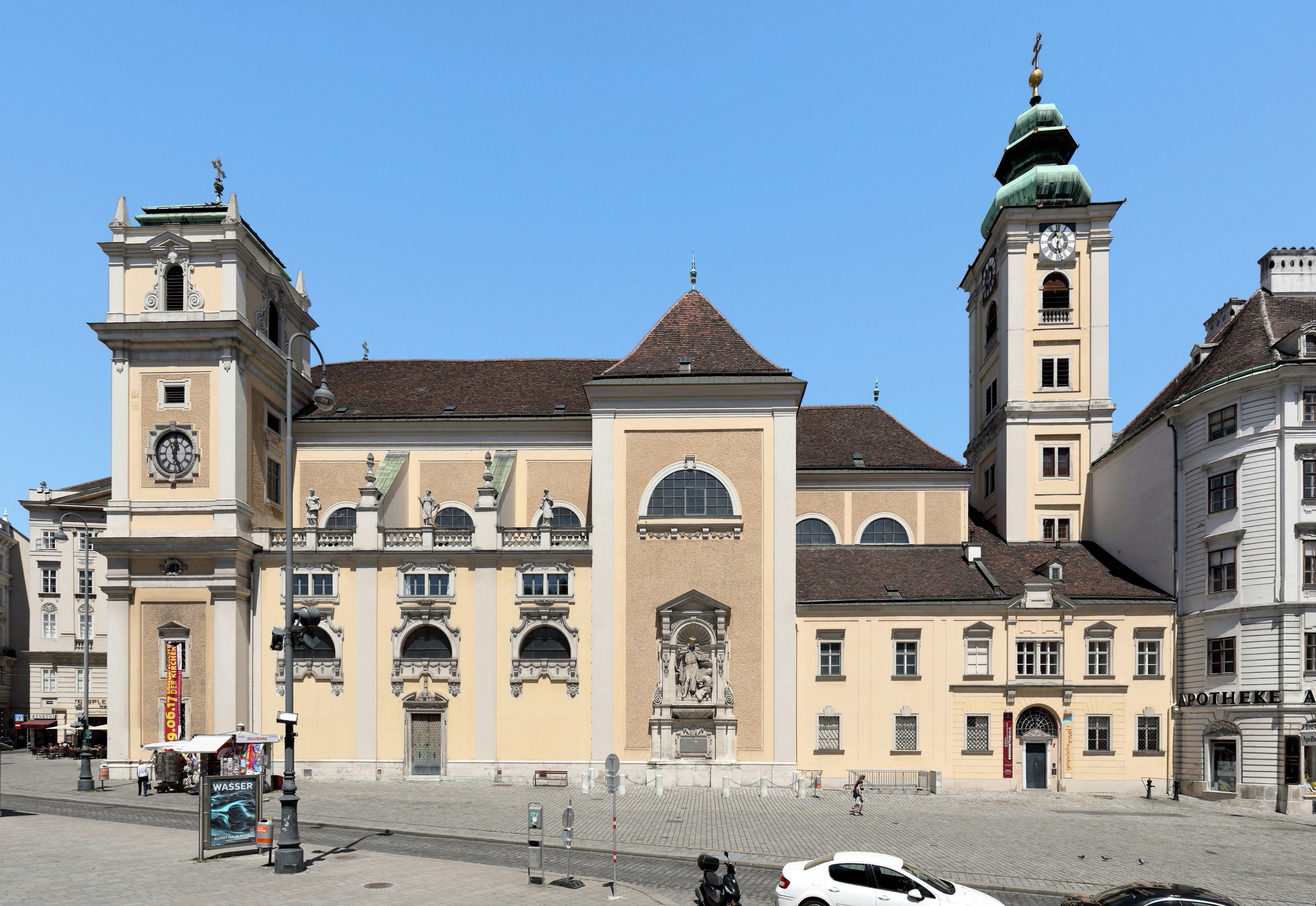 Südansicht der Schottenkirche im 1. Bezirk der österreichischen Bundeshauptstadt Wien mit dem Jasomirgott-Denkmal.Die erste Stiftskirche wurde 1200 geweiht. Nachdem die "Schotten" das Kloster aufgaben und 1418 es die Melker Benediktiner übernahmen, erfolgte von 1446 bis 1449 der gotische Neubau des Chors und von 1449 bis circa 1454 die Erneuerung der Mittelschiff- und Querhausgewölbe sowie der Umbau der Westfassade. 1638 stürzte der Turm nach Blitzschlag ein. Dies wurde zum Anlass genommen, die Kirche in 10 Jahren gravierend umzubauen bzw. weitgehendst neu zu errichten und sie erhielt dabei im Groben ihr heutiges Erscheinungsbild.Das Jasomirgott-Denkmal wurde 1893 von dem Bildhauer Josef Breitner in Gedenken an Jasomirgott, Gründer des Schottenstiftes (1155), geschaffen.